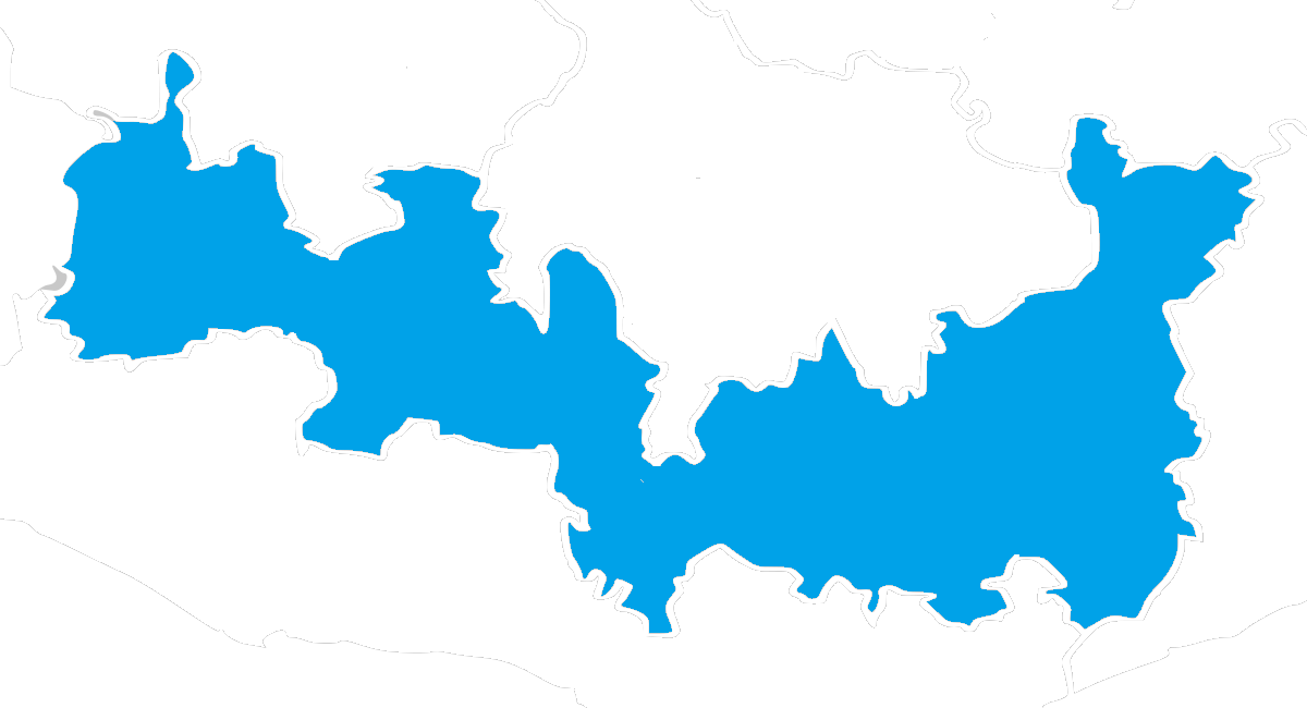 Región Sierra Sur, una de las ocho regiones que conforman al estado mexicano de Oaxaca.